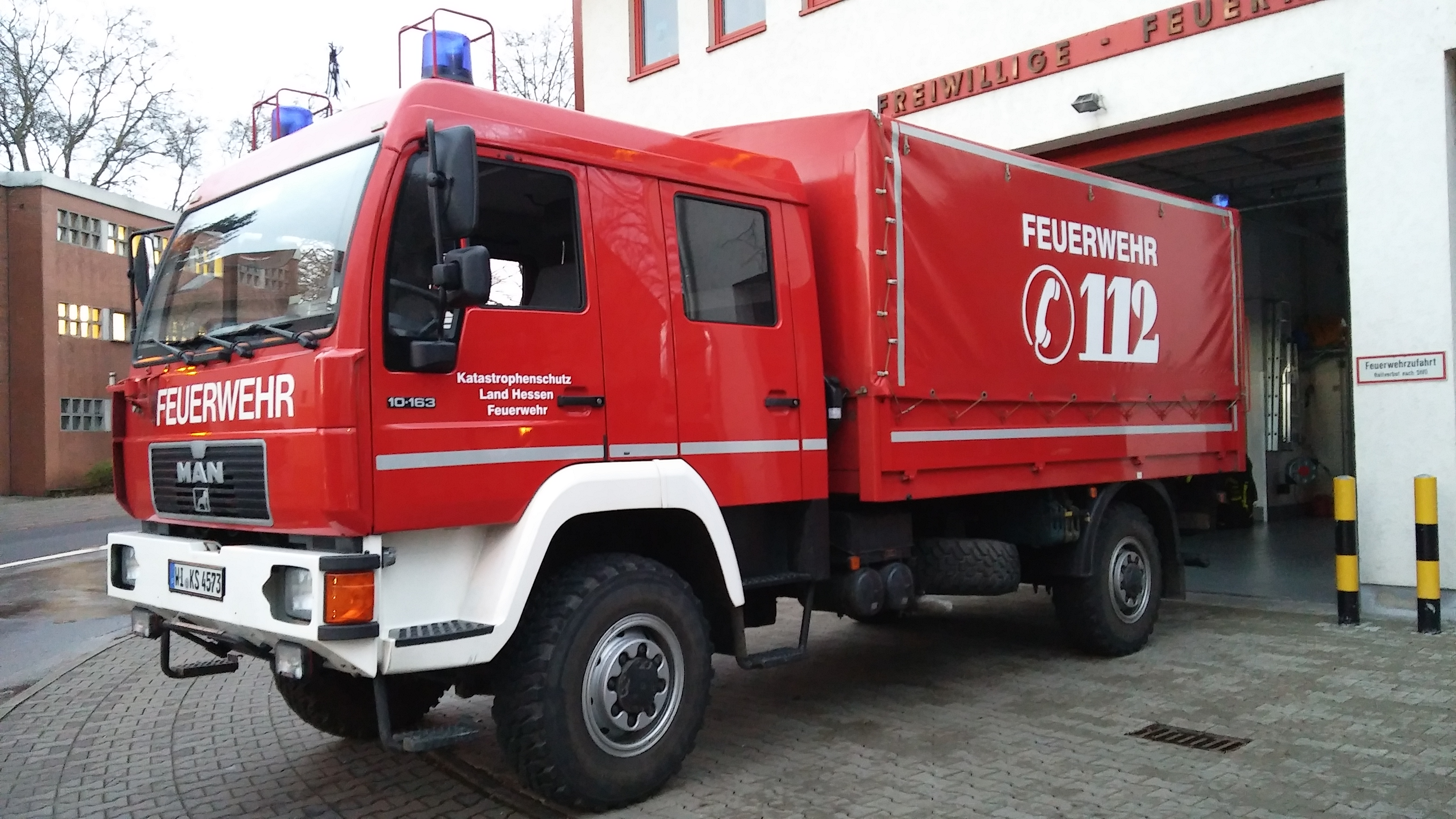 Gerätewagen Dekontamination Personal -Katastrophenschutz Hessen auf dem Gelände der Freiwilligen Feuerwehr Ffm-Praunheim, links im Hintergrund das ehemalige Gebäude der Praunheimer Werkstätten, jetzt Flüchtlingswohnheim "AP2"